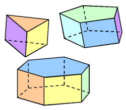 ruimtelijk figuur - eigen werk ism danielm - publiek domein